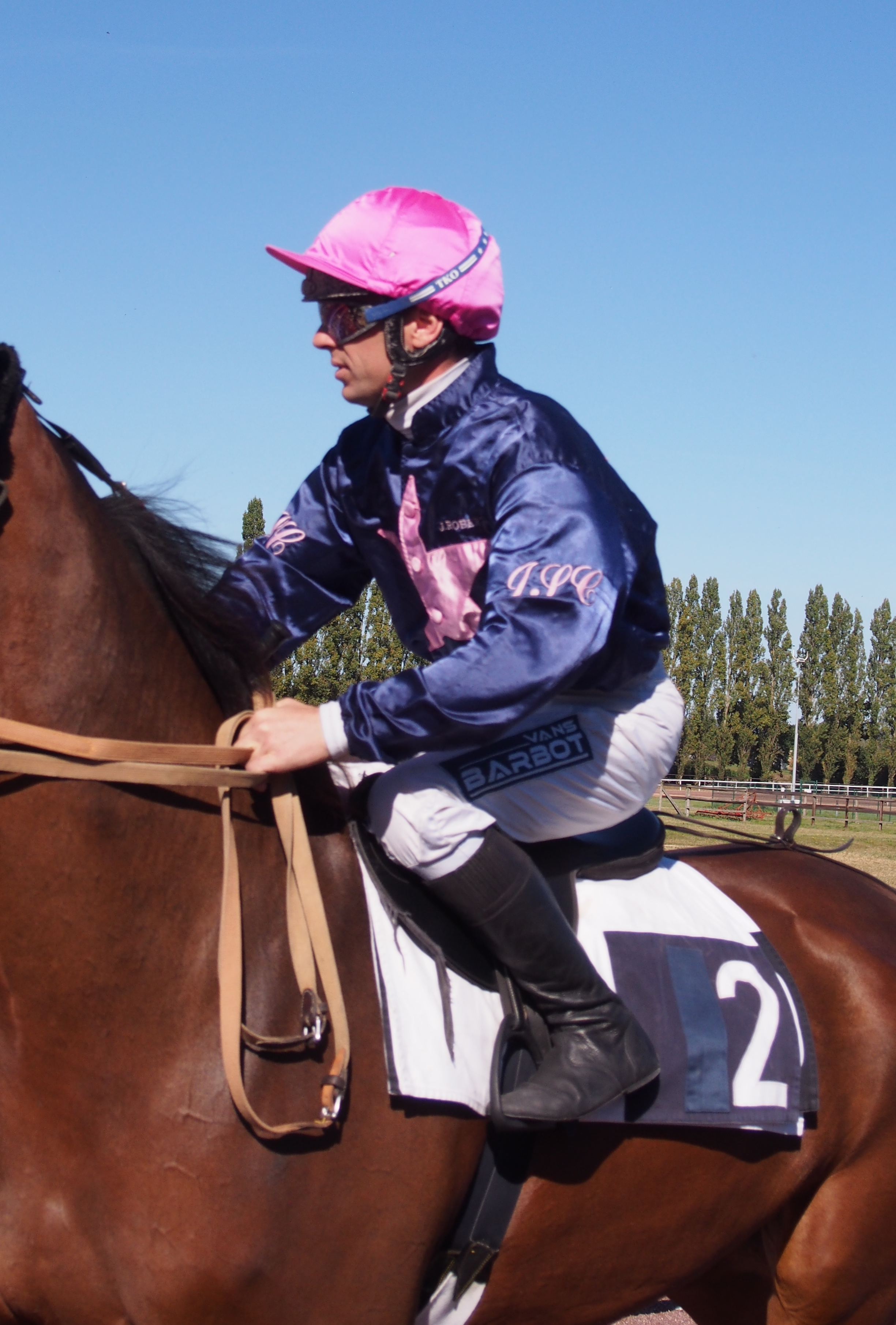 Le jockey Yoann Lebourgeois, entrant sur l'hippodrome Robert-Auvray de Vire (Normandie, France), en selle sur Darko des Brousses, le 26 septembre 2018.